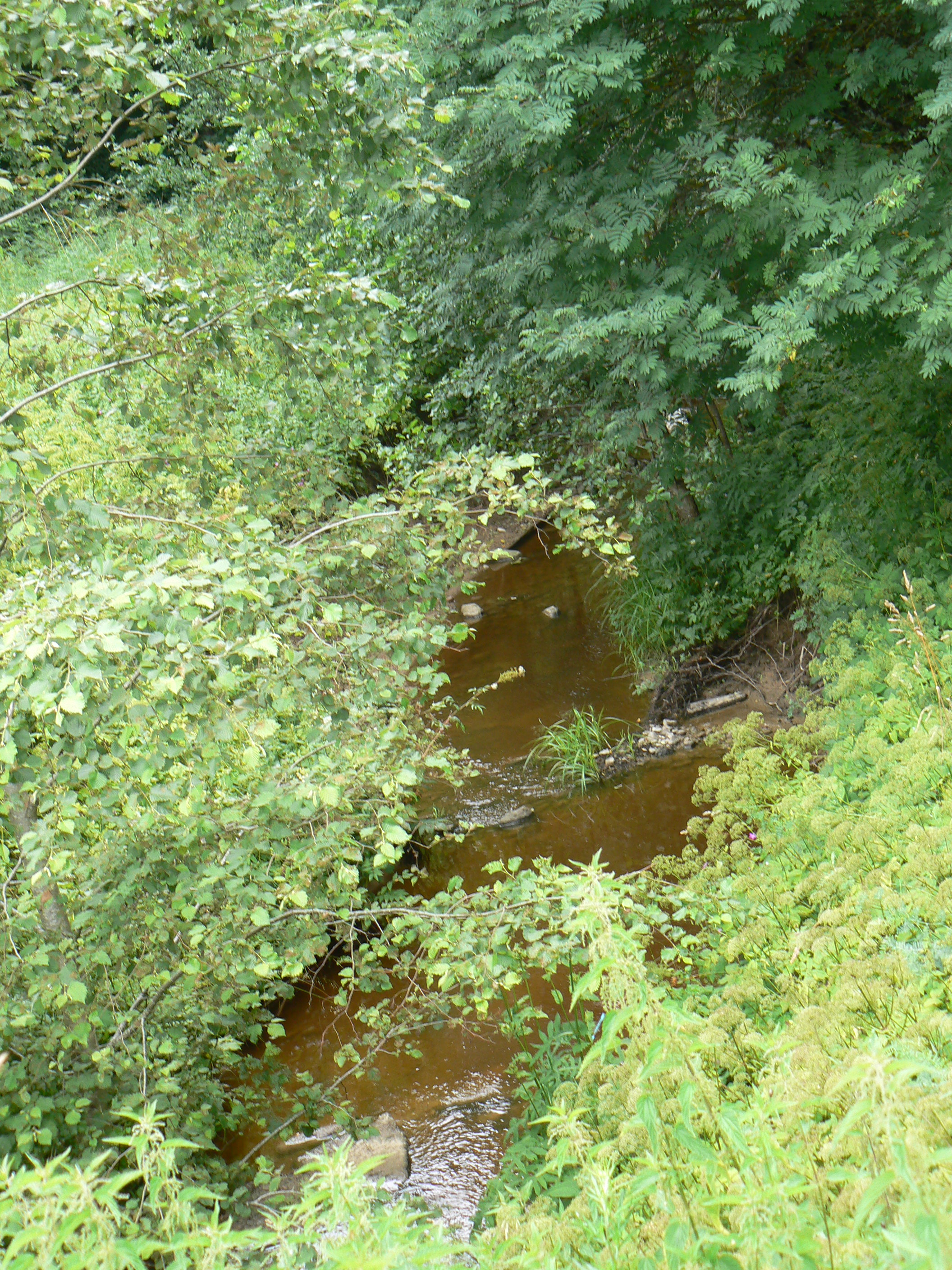 Potok Gramančia u vsi Tuščiai, nedaleko na SV od Pagramantisu